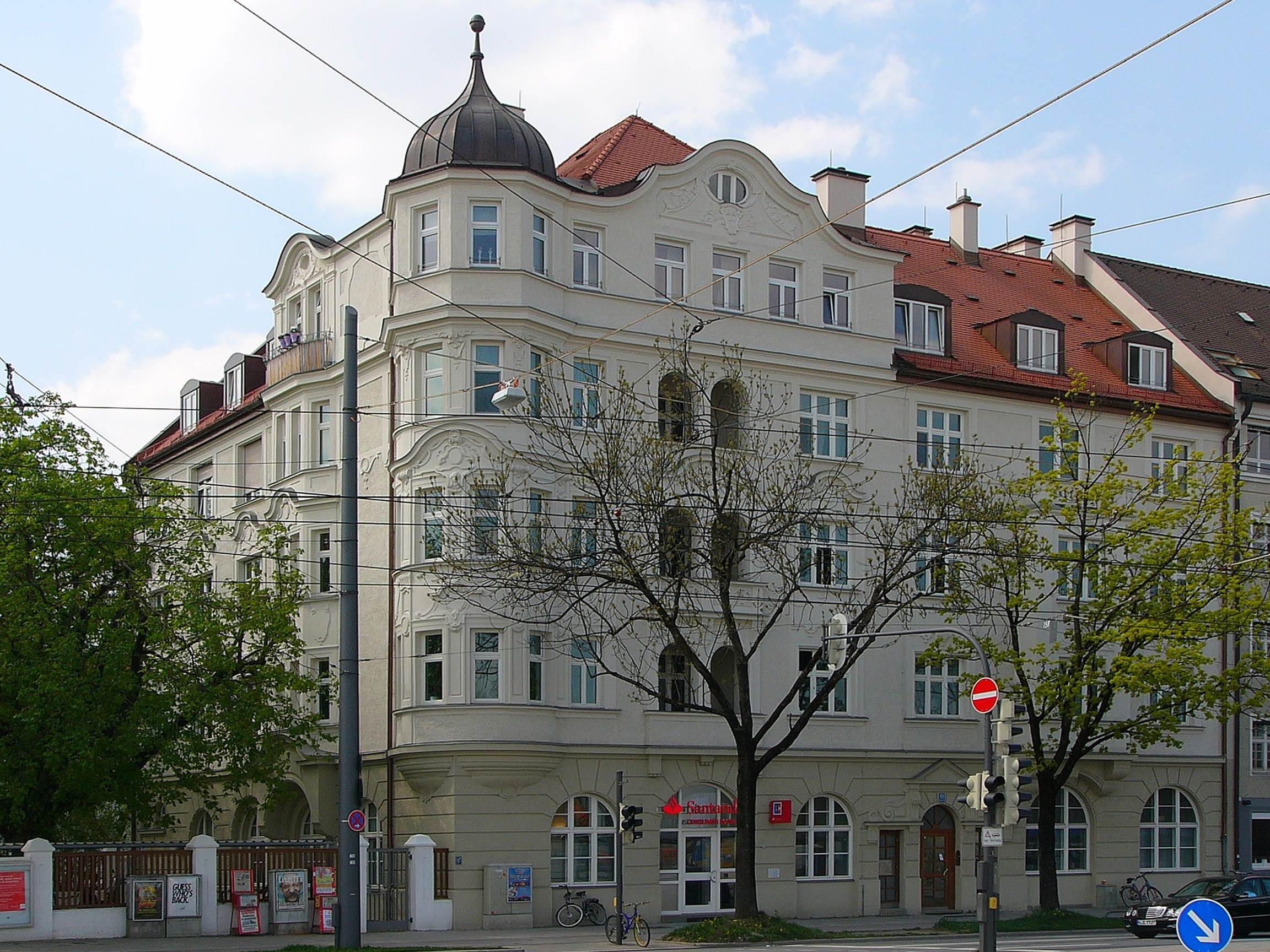 Mietshaus; neubarock, mit Erkerturm an der Ecke und Stuckdekor, 1905–06 von Georg Dorner; am Parzivalplatz.This is a photograph of an architectural monument.